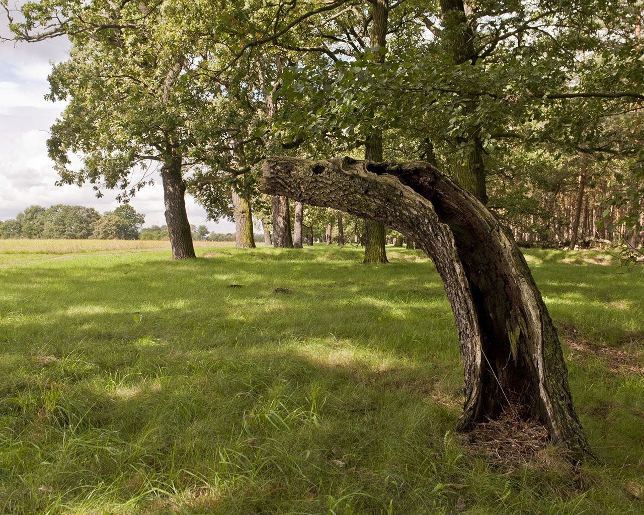 NSG Diebziger Busch: Eichenbäume am Rande des Diebziger Busches